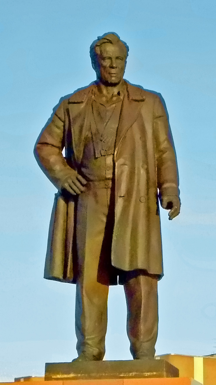 Astafiyev, V.P.